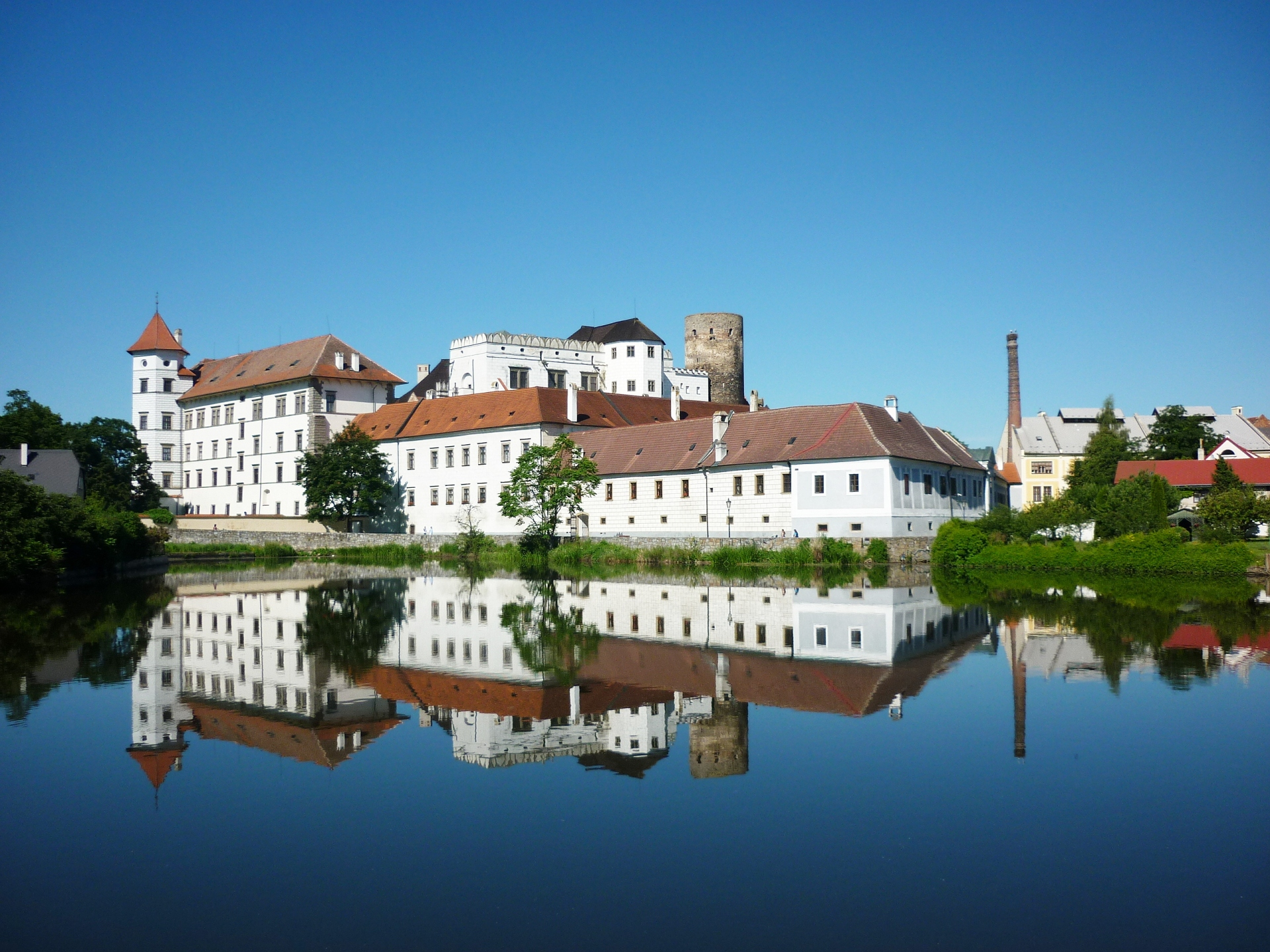 Vajgar a Malý Vajgar, rybníky na Hamerském potoce v Jindřichově Hradci